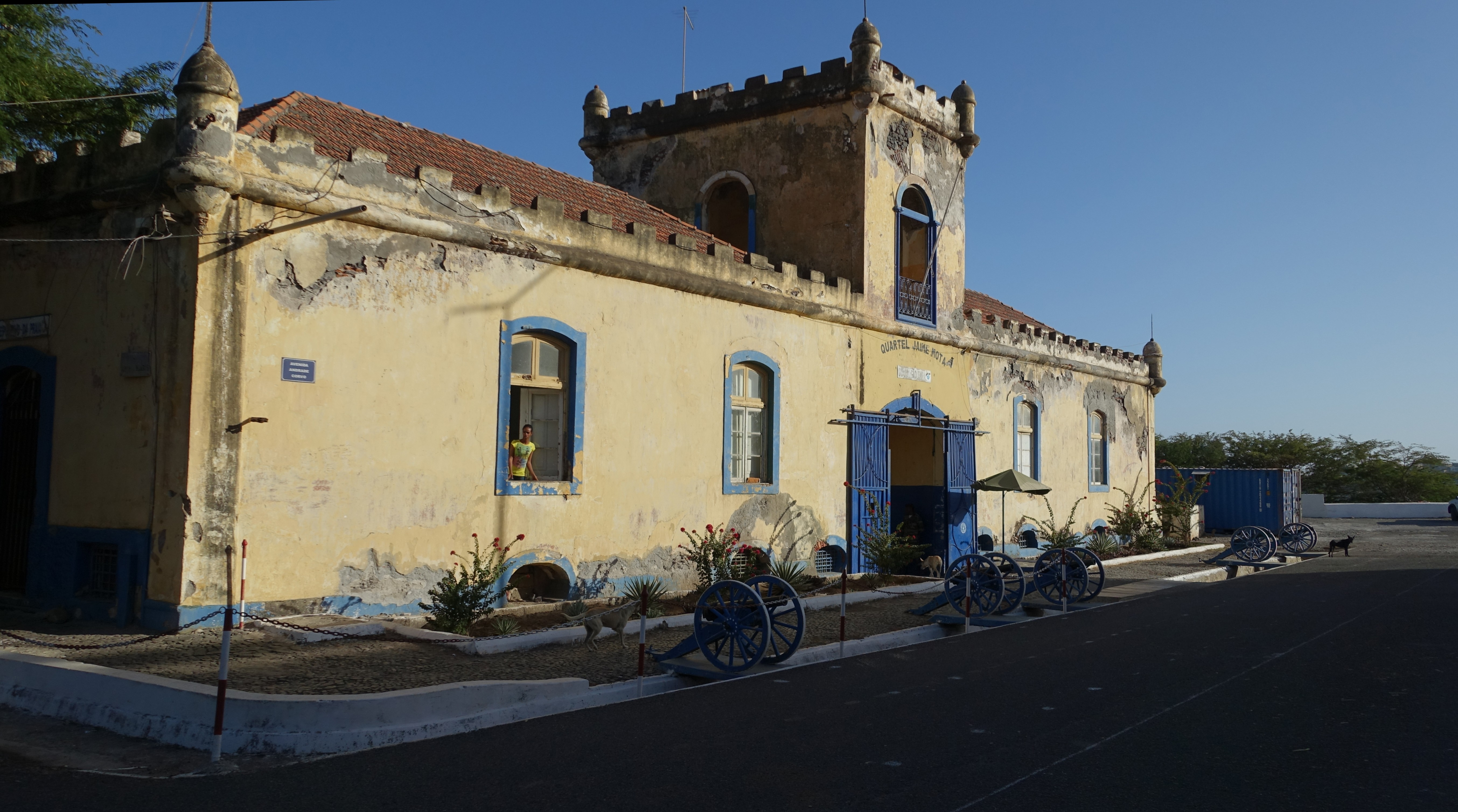 Praia - Kaserne 19.Jh